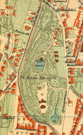 St. Hanshaugen.